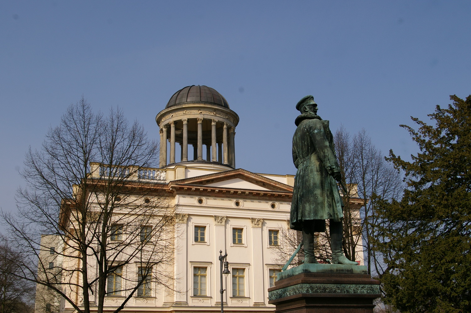 Museum Berggruen : extérieur